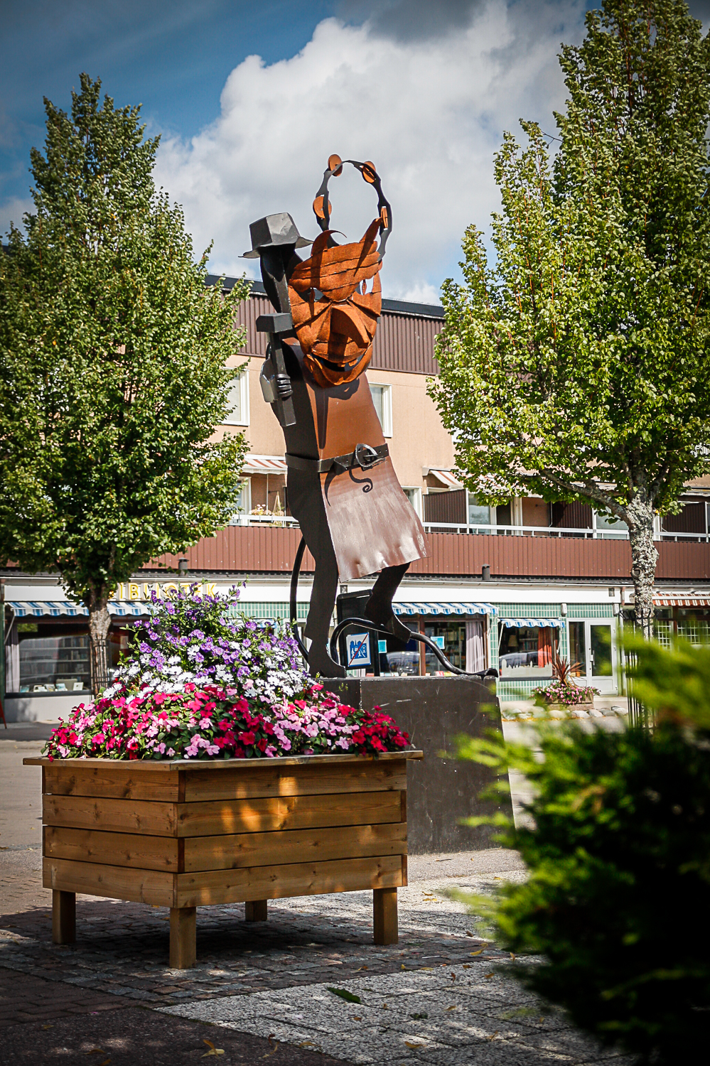 Torget i Gimo, en sensommardag.